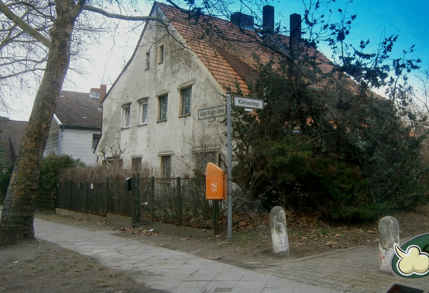 Der Klötzesteig ist eine Straße in Berlin-Lübars. Hier der Blick vom den Zabel-Krüger-Damm auf die Südostecke zu einem erweiterten Wohnhaus der Kriegesiedlung.